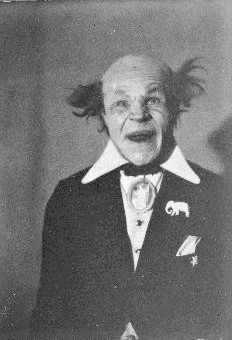 Hendrik Saar tsirkuse "Arena" klounina